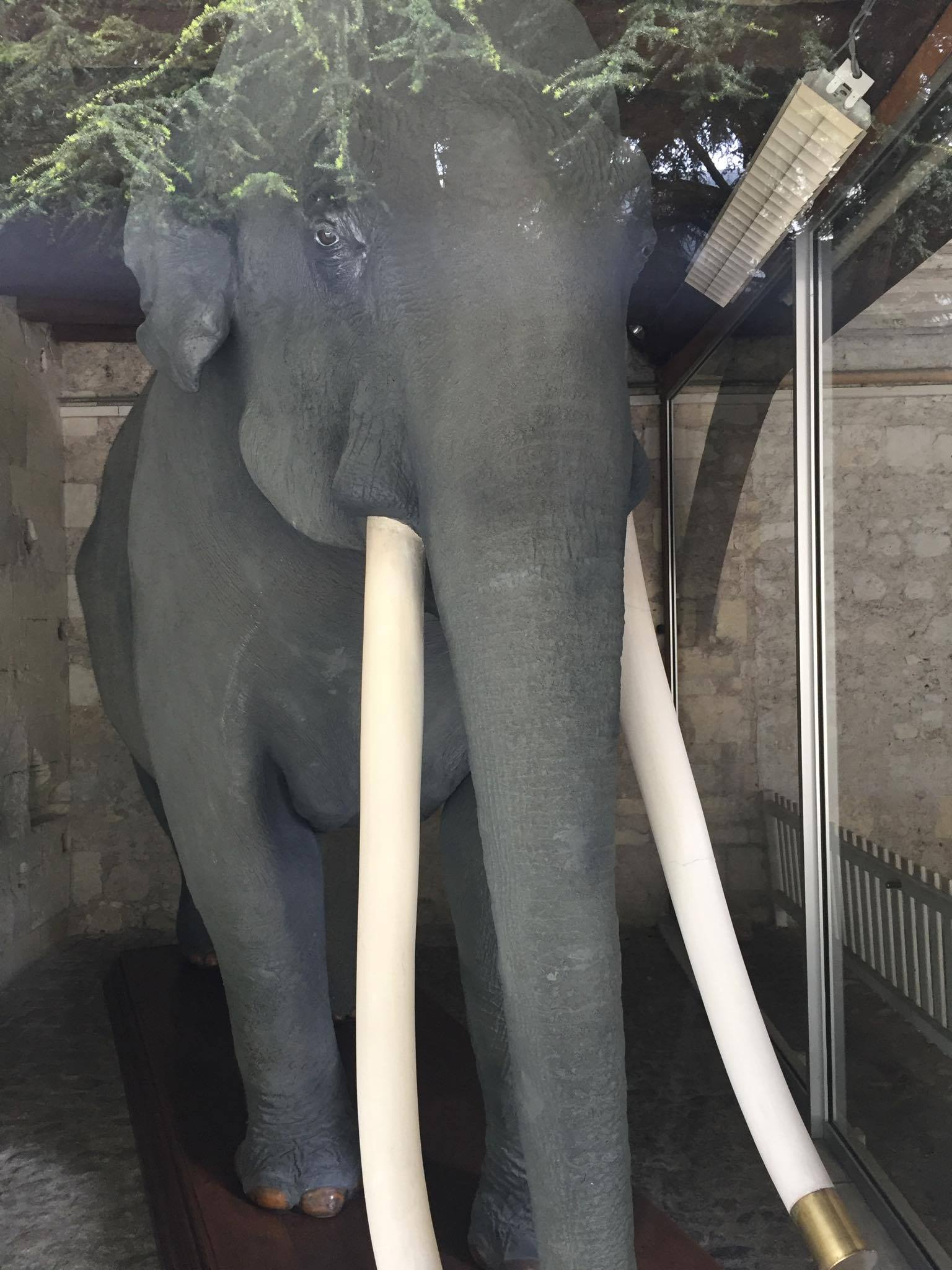 Fritz l'éléphant de face derrière la vitre au musée des beaux-arts de Tours.